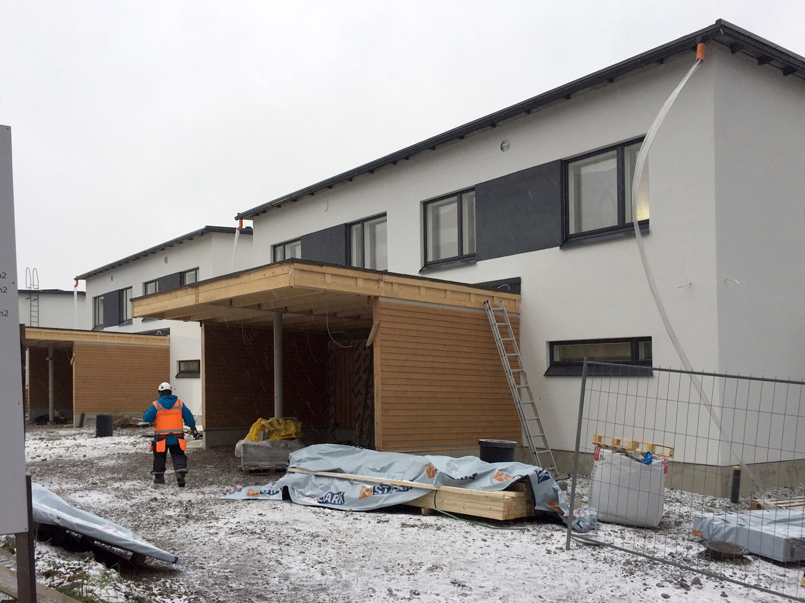 Uutta talokantaa rakennetaan Pohjois-Tapiolassa Koivunkanto 6-8:ssa marraskuussa 2016.